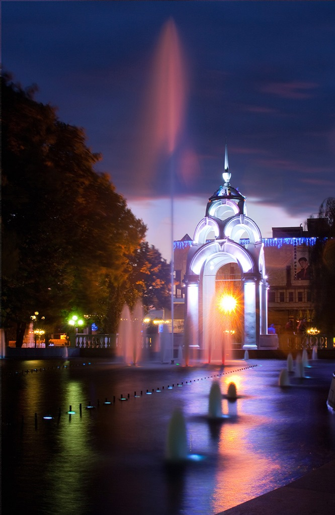 Зеркальная струя, Харьков